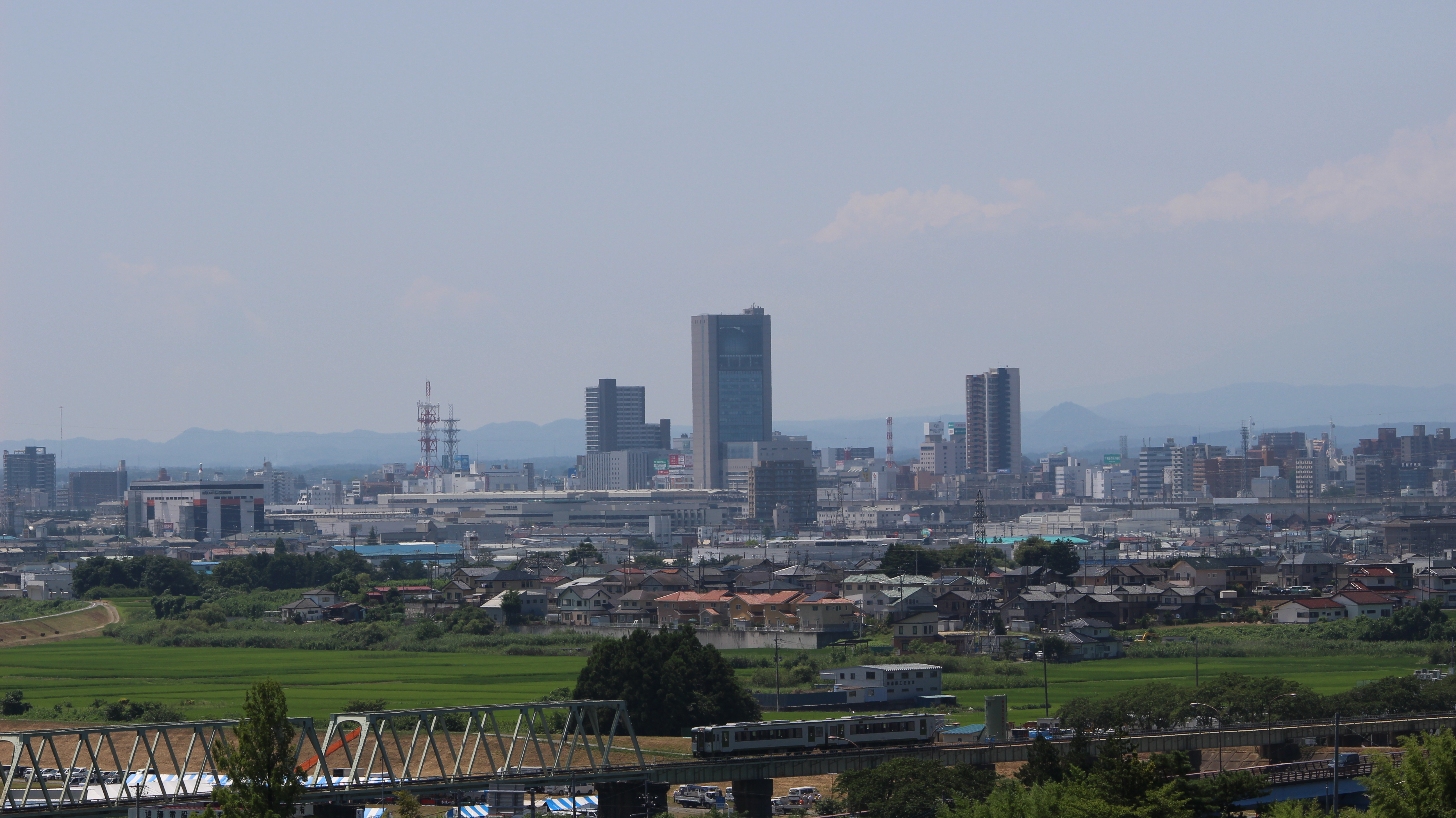 富久山町の高台から望む郡山市街地遠景